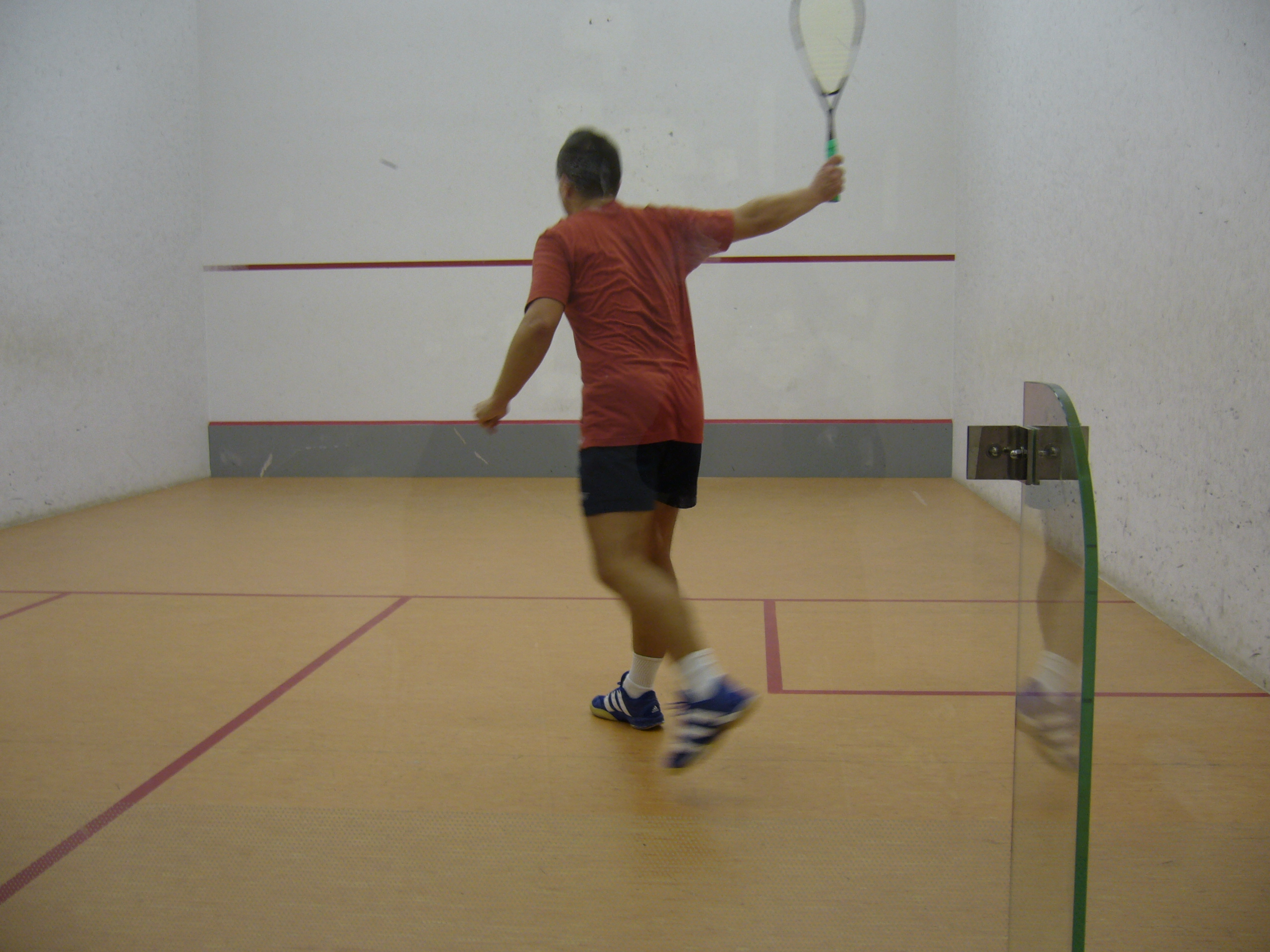 Fallabdázó játékos